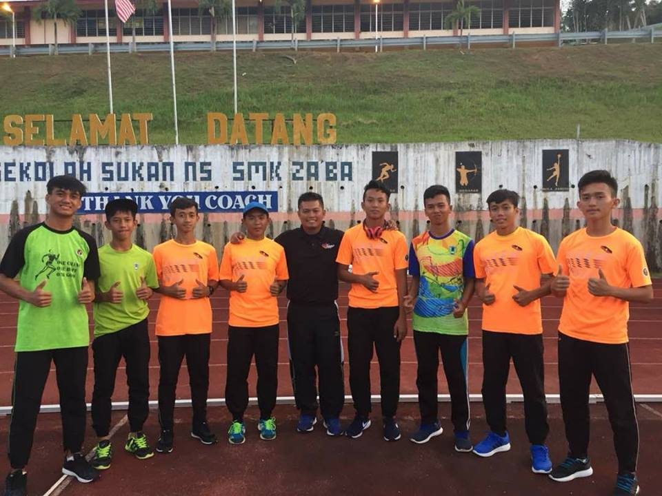 Olahraga